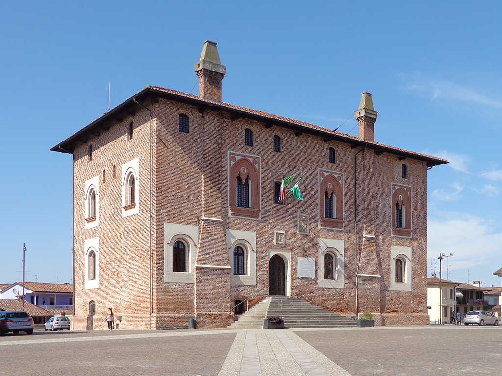 Borghetto Lodigiano, palazzo Rho.